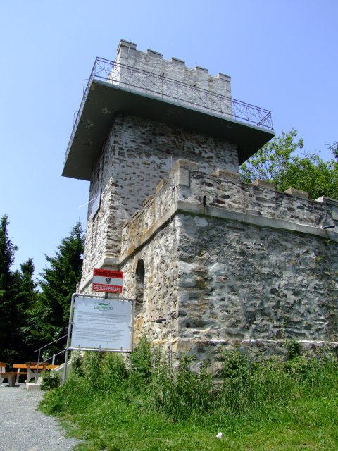 Írottkői kilátó